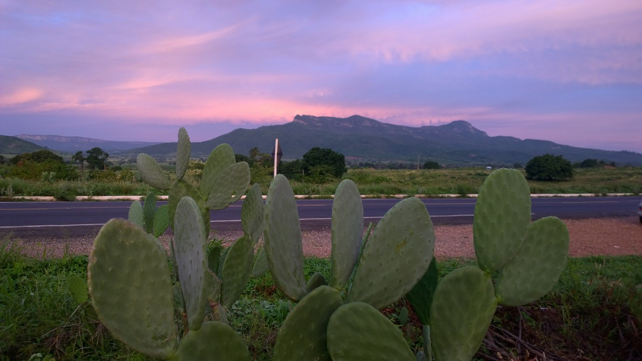 Vista da Serra Geral ao sul do Parque Estadual Caminho dos Gerais, a partir da Rodovia MG 122, trencho entre as cidades de Mato Verde e Monte Azul, no Norte de Minas Gerais